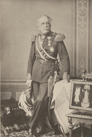 Königlich niederländischer General-Lieutenant Wolf Curt von Schierbrand (um 1867)